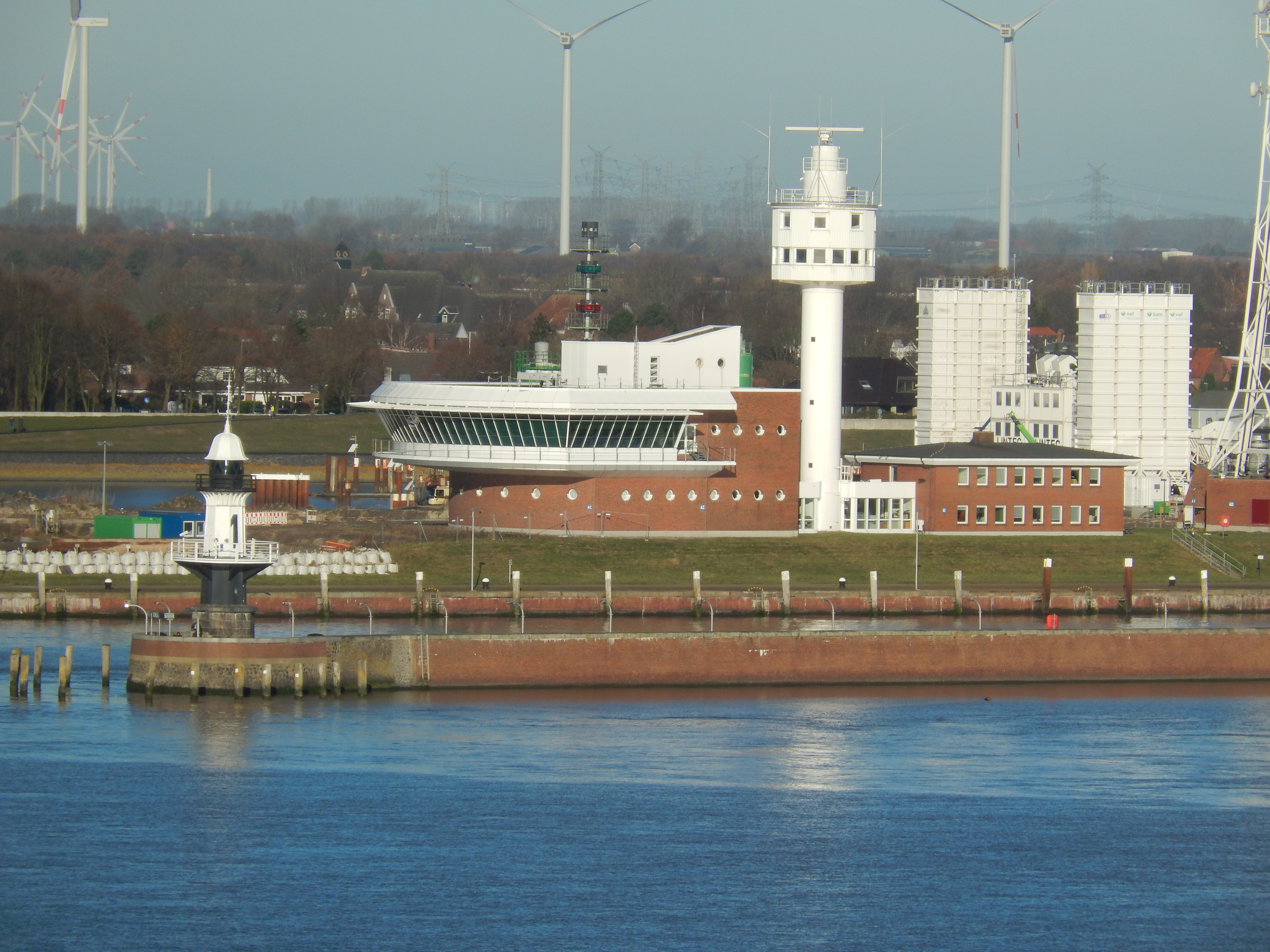 Verkehrszentrale für die Elbe in Brunsbüttel, 2016